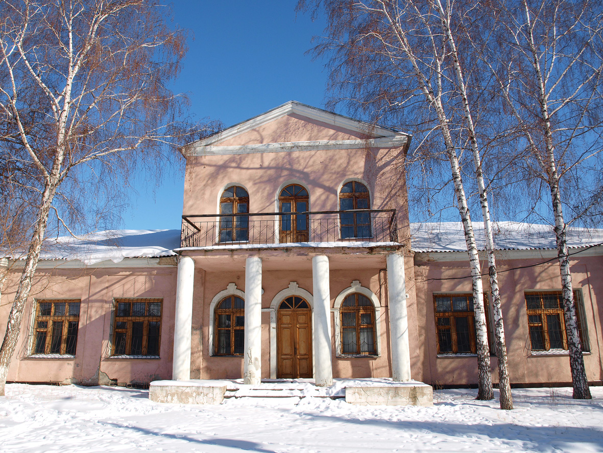 Луганськ. Особняк Іллєнка